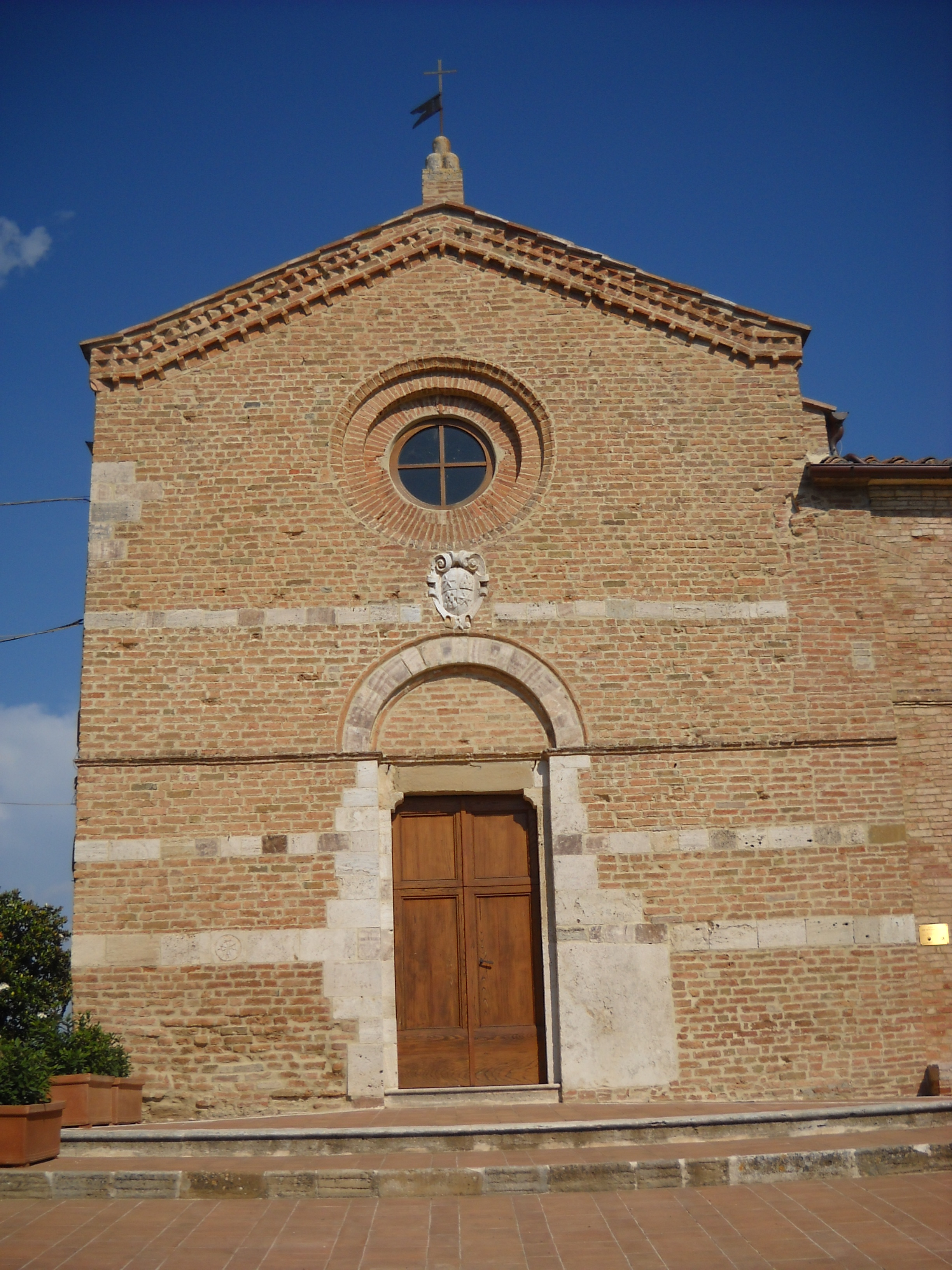 La facciata a capanna con rosone e portale della Pieve di San Giovanni Battista a San Giovanni d'Asso, in provincia di Siena.